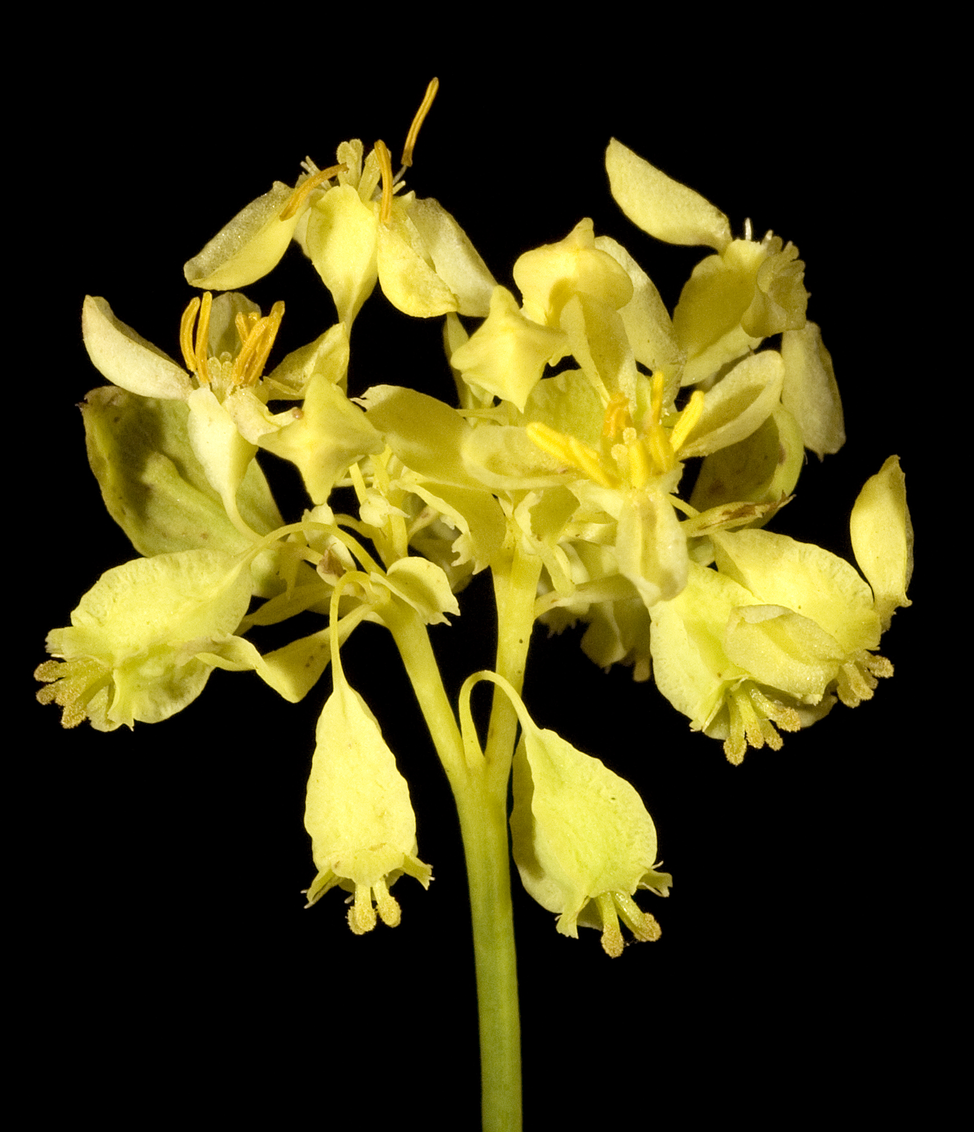 KRT3095